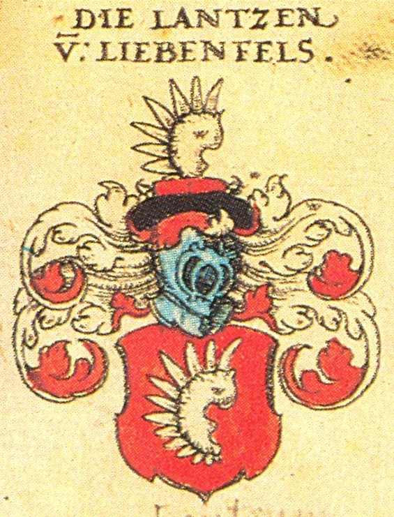 Ritterschaft und Adel aus Schwaben Die Lantzen von Liebenfels / Lanz von Liebenfels